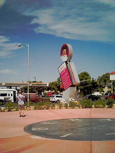 Liberace Museum